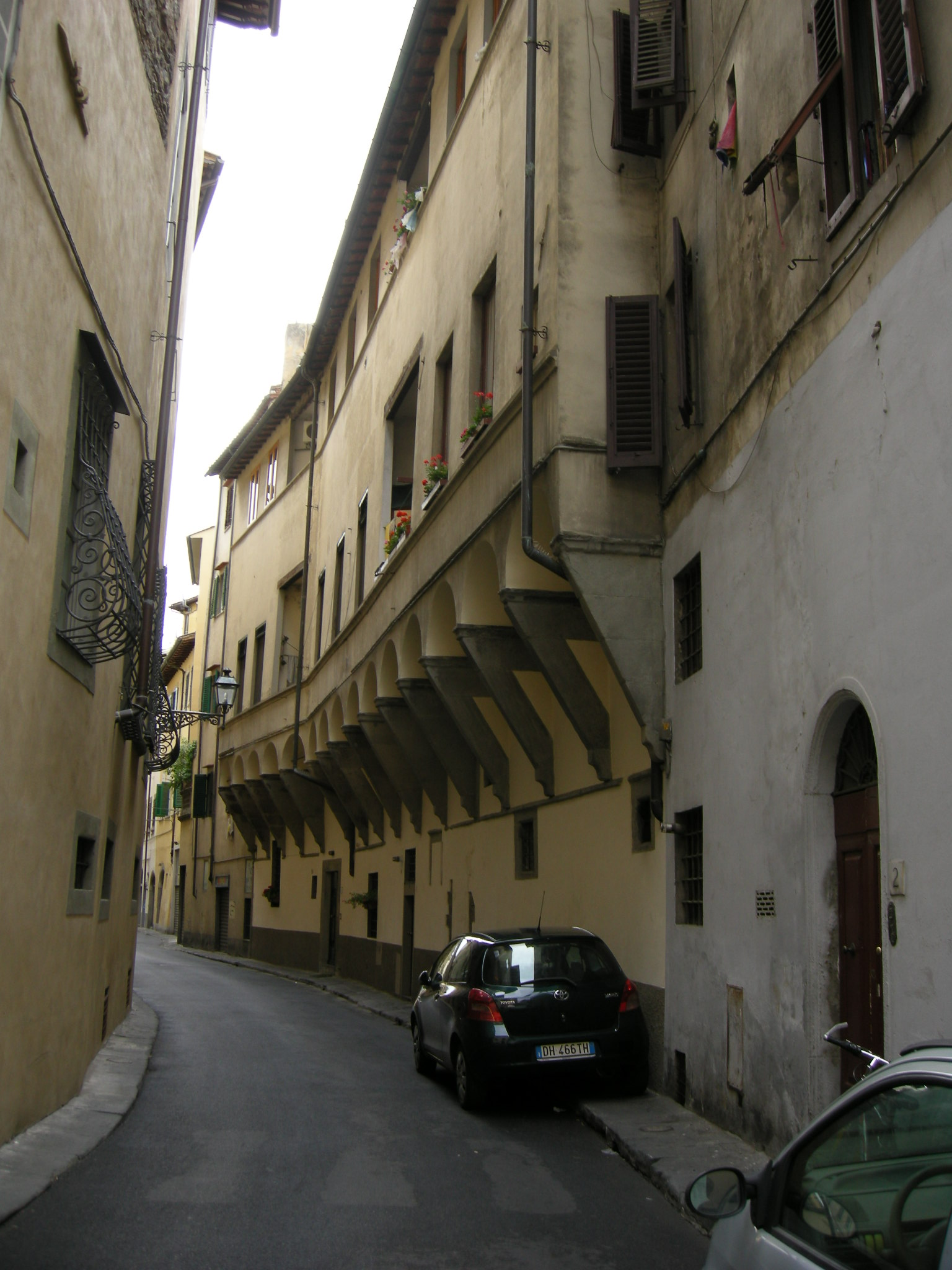 Retro di Mellini, via dei Vagellai